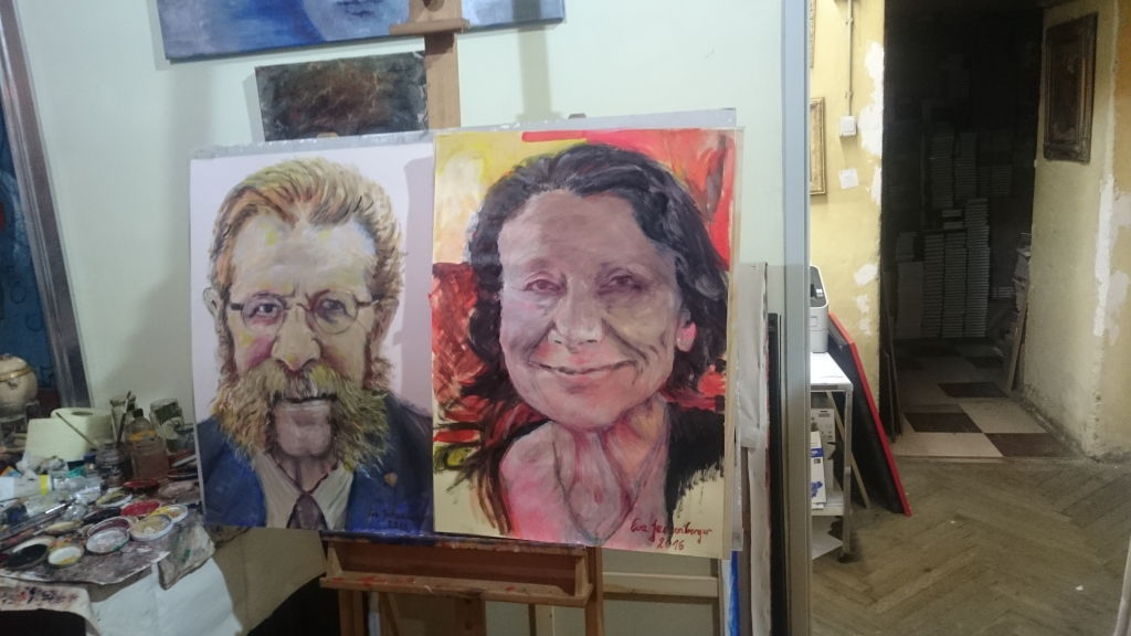 "Zweiter Wiener Porträtsalon", Eva Jansenbergers Atelier